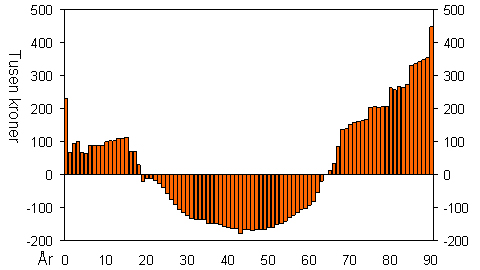 Diagrammet viser hvordan innbyggerne i en moderne velferdsstat veksler mellom å være forsørgere og forsørgede gjennom livets ulike faser.